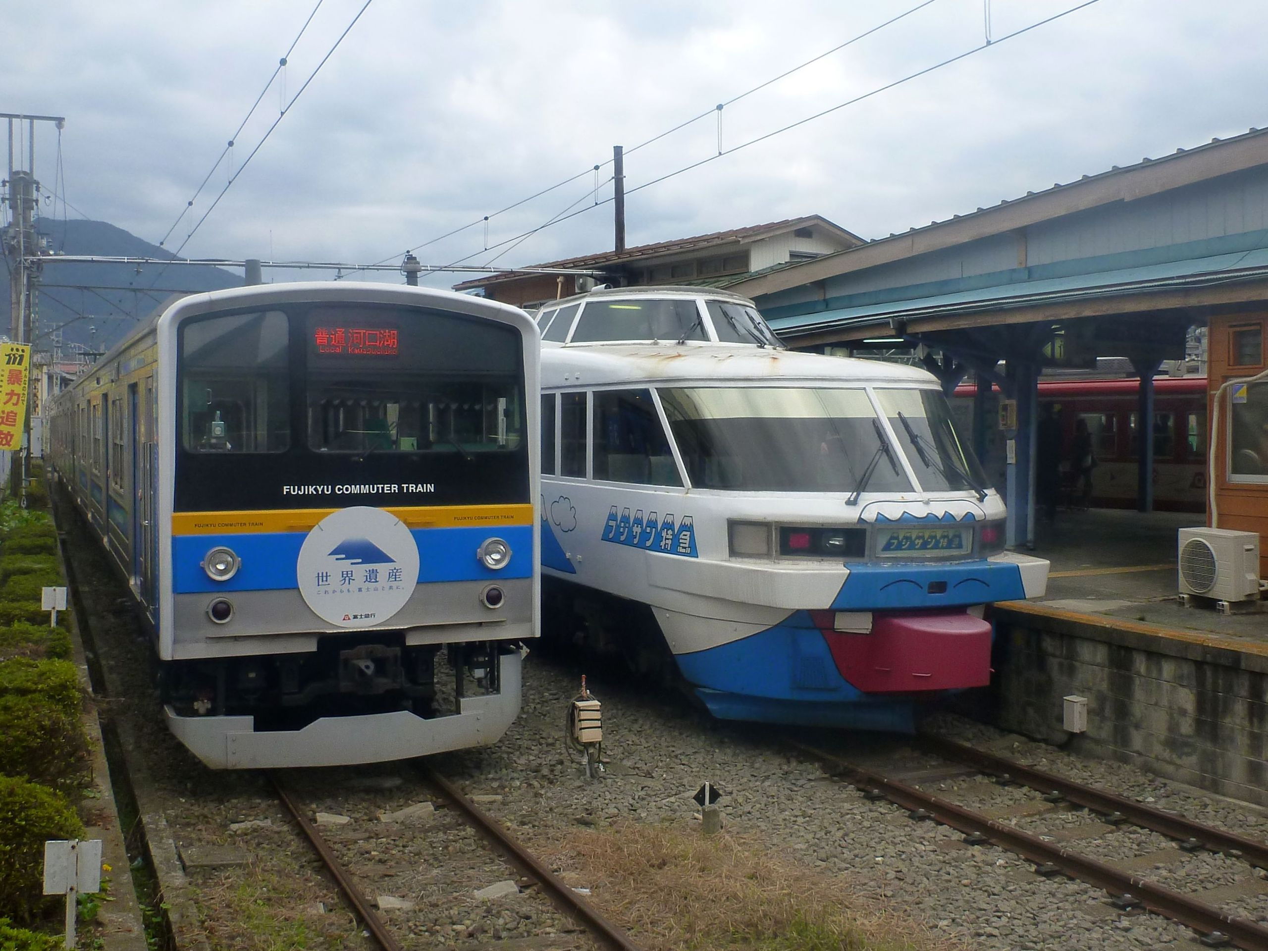 Fujikyu Otsuki Station